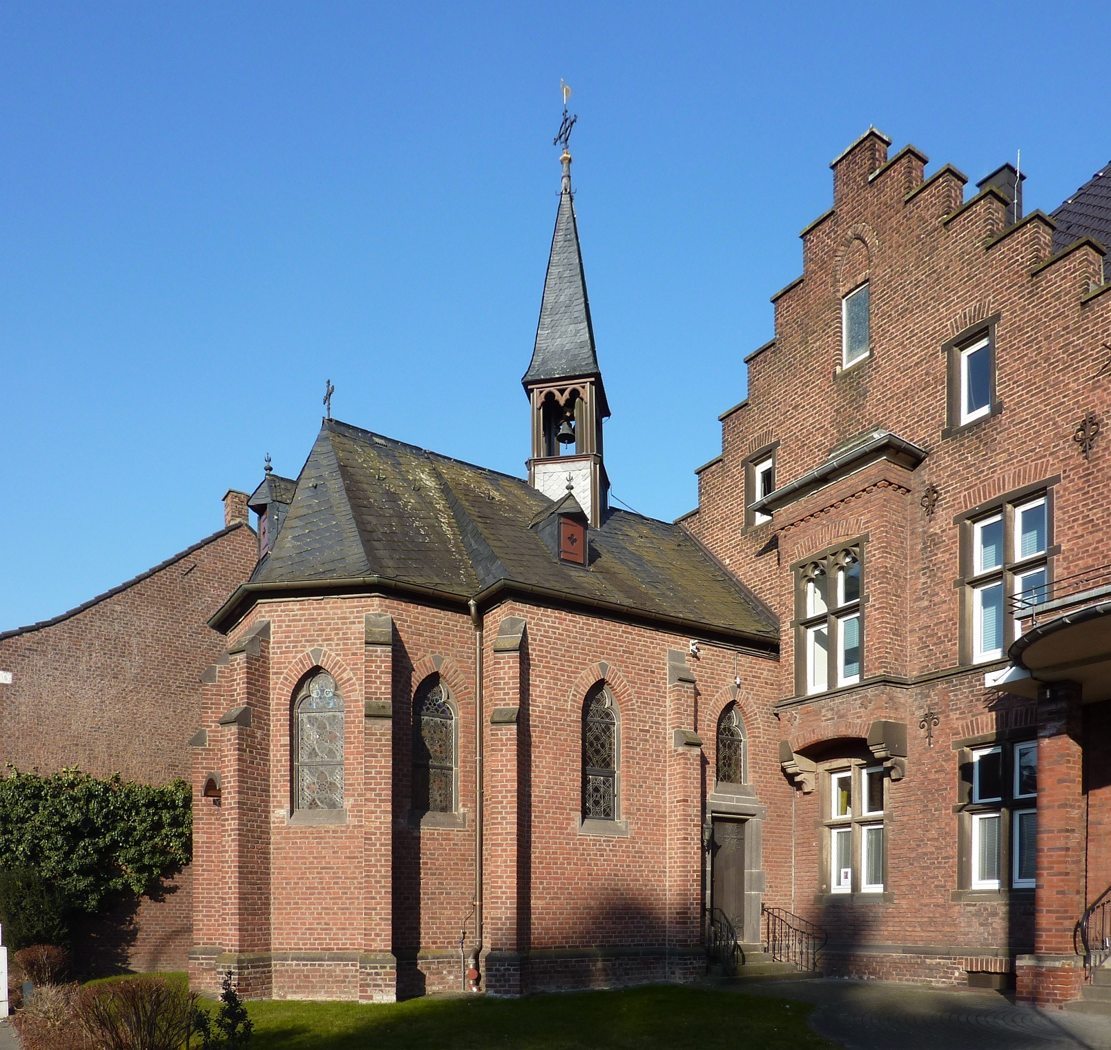 Kapelle des ehemaligen Krankenhauses Glehn (Korschenbroich)